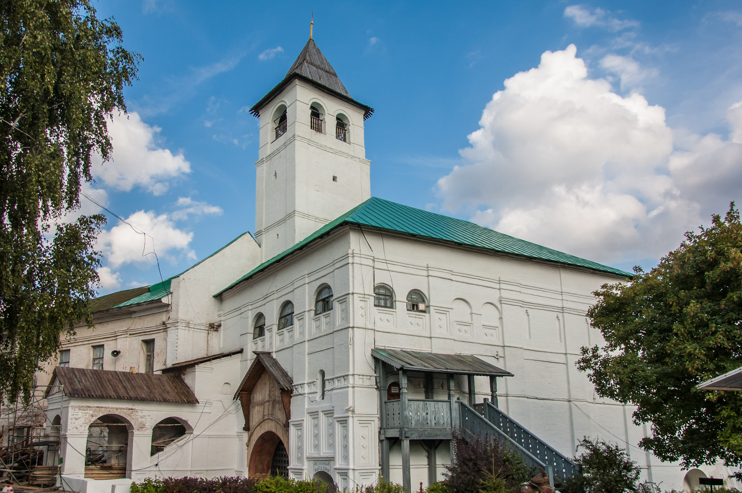 Святые ворота с ц.Введения во храм Пресвятой Богородицы: площадь Богоявленская, 25, Ярославль, Ярославская область